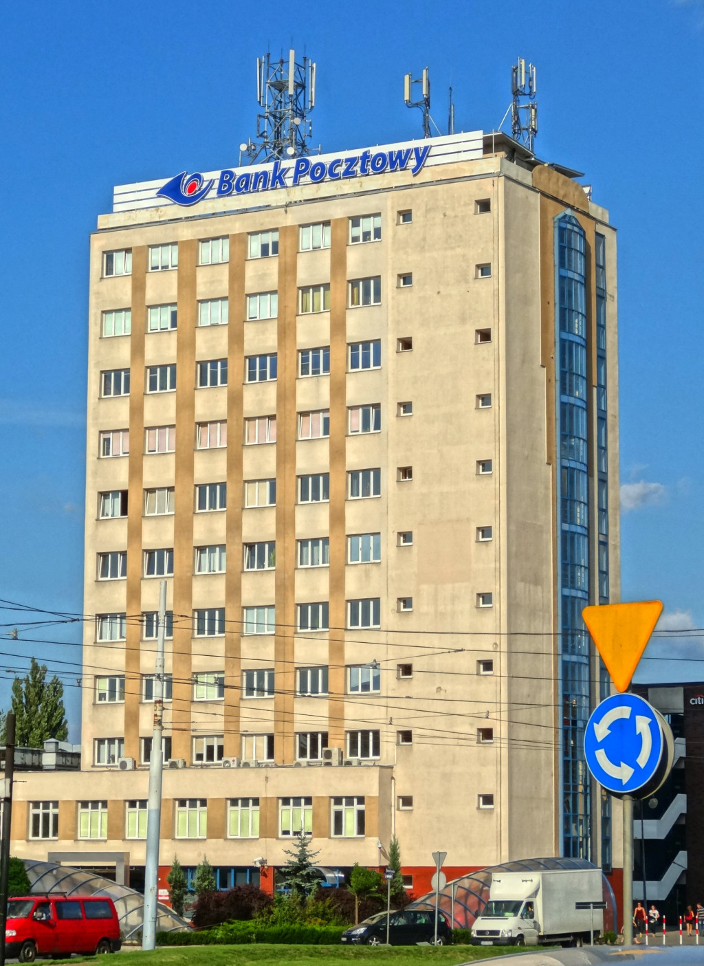 Bank Pocztowy w Bydgoszczy przy ul. Jagiellońskiej